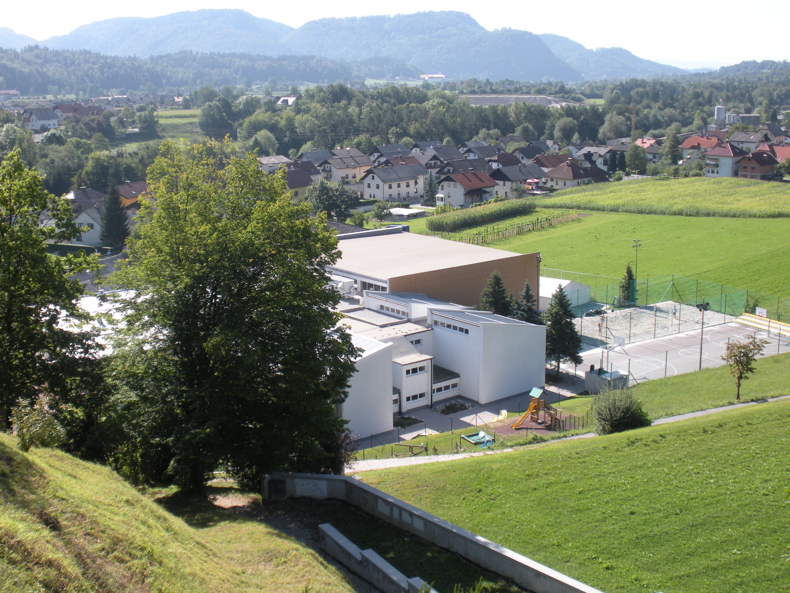 Zgornje Stranje, pogled na šolo z okolico.